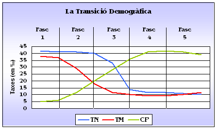 Gràfic on es dibuixen les 5 fases de la Transició Demogràfica. Elaboració pròpia